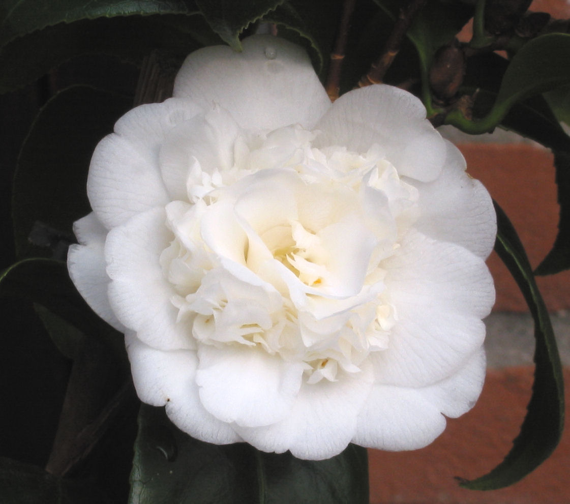 Camellia japonica 'Nobilissima'